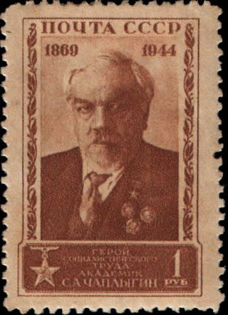 Почтовая марка СССР - Чаплыгин Сергей Алексеевич, Герой Социалистического Труда